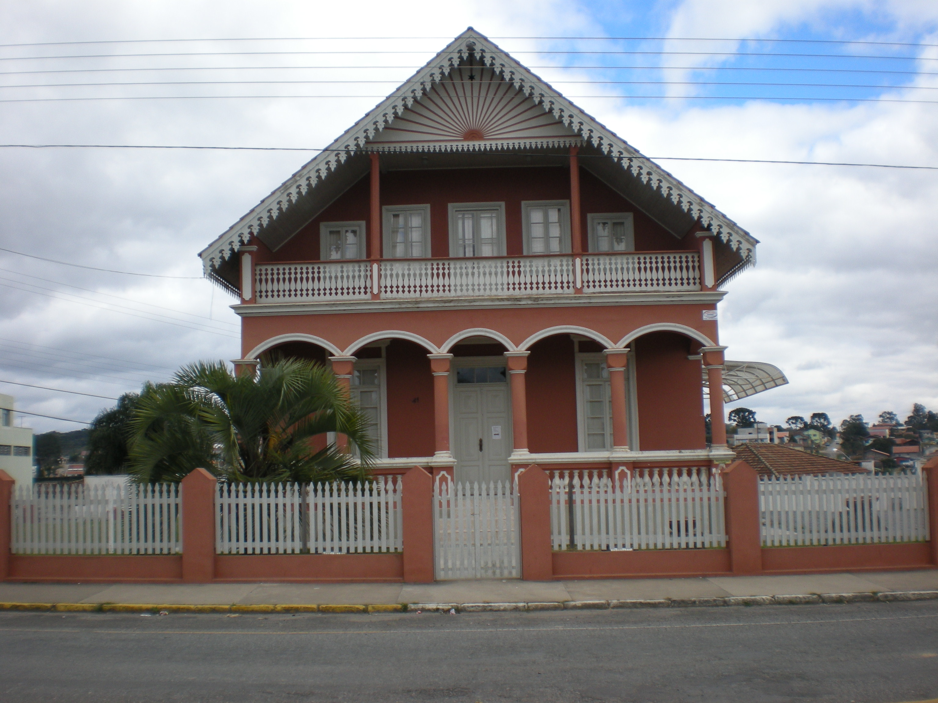 Casa antiga em Mafra (Santa Catarina)